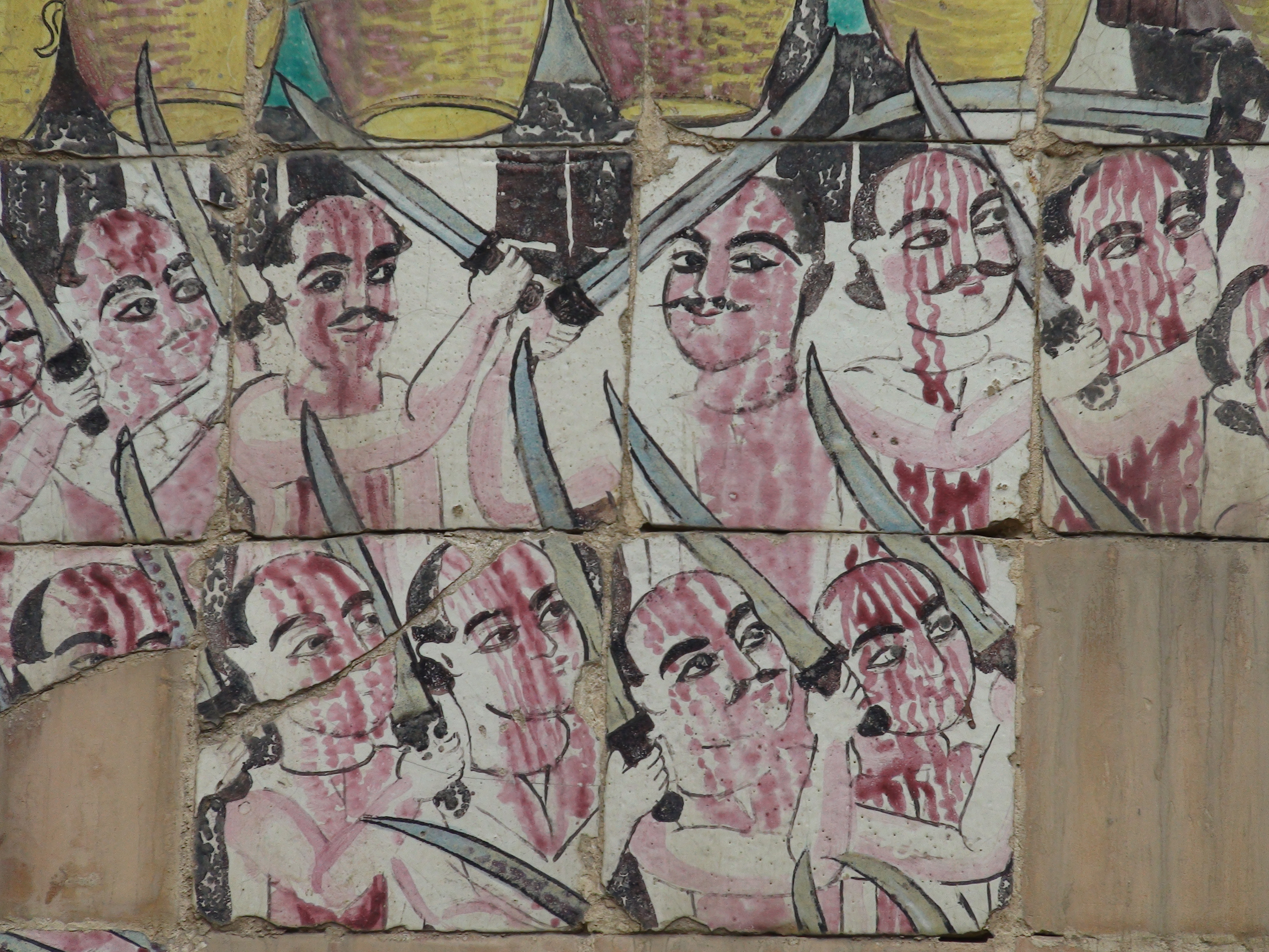 نگاره قمه‌زنی در کاشیکاری‌های تکیه معاون‌الملکمجموعه بناهای تکیه معاون‌الملک